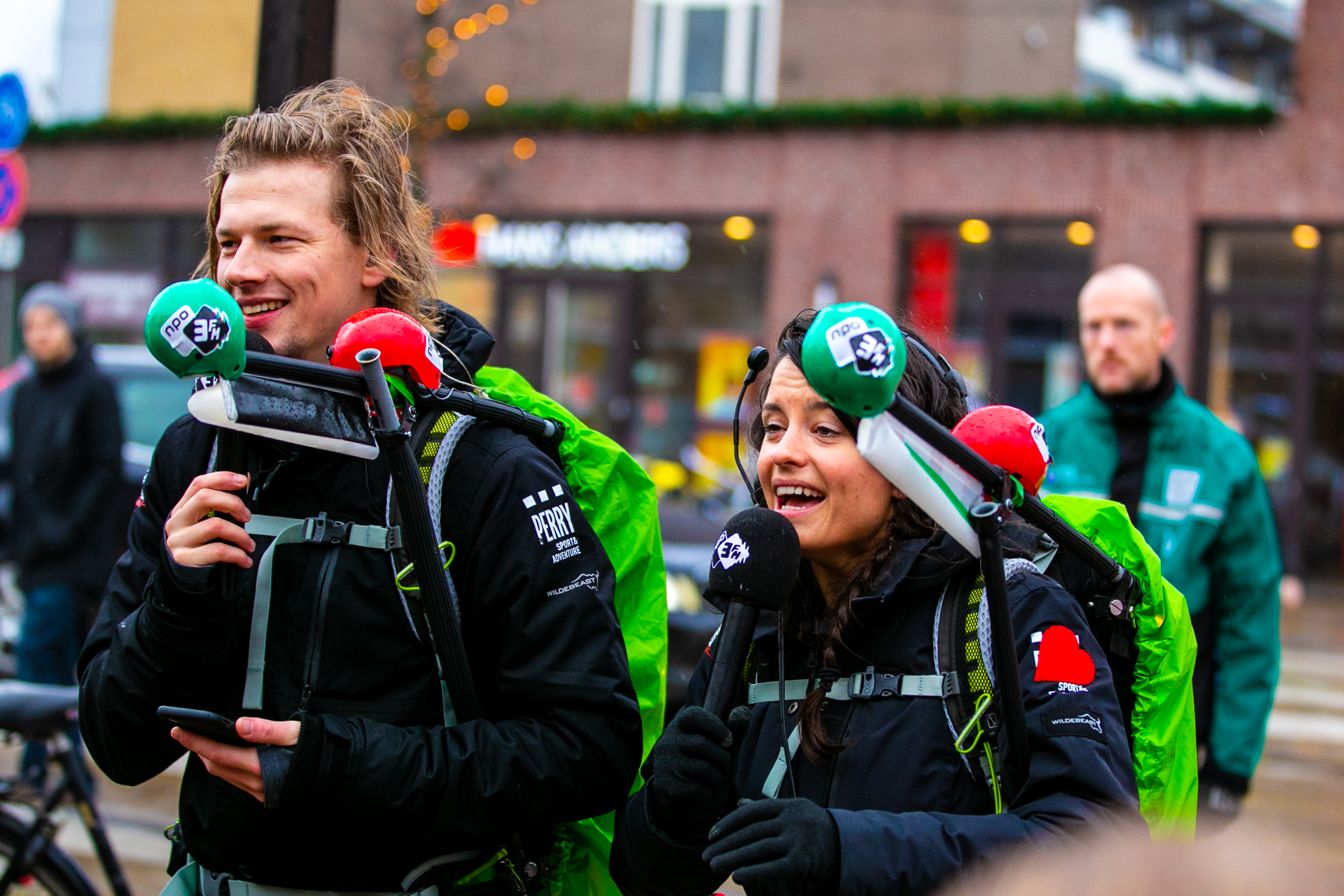 Dj-team Eva en Sander tijdens Serious Request The Lifeline 2018